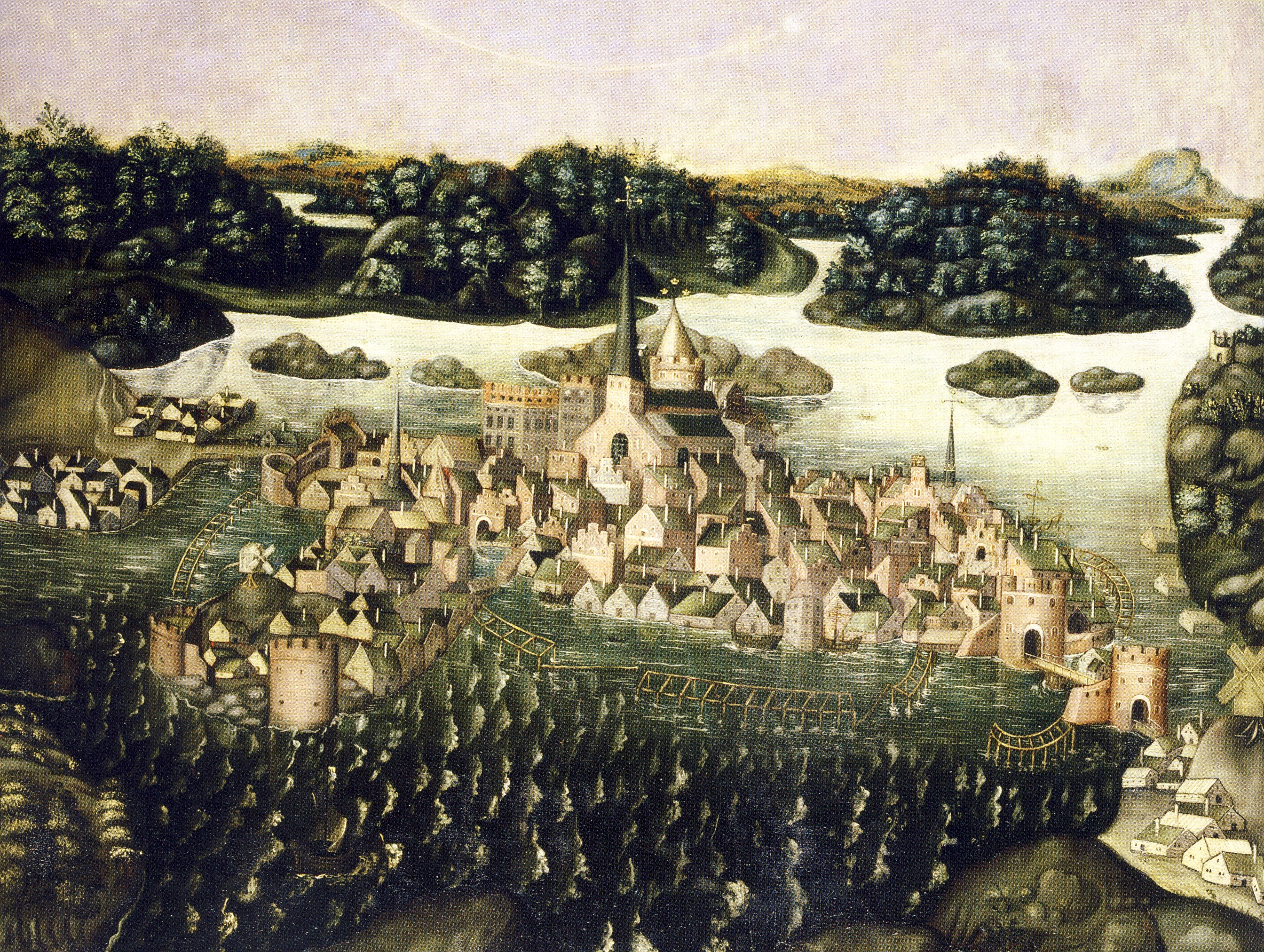 "Vädersolstavlan", ursprungligen målad av Urban målare 1535, hänger i Storkyrkan i Stockholm. Det är den äldsta bilden av Stockholm och finns avbildad på tusenkronorssedeln. Den nuvarande bilden är dock en kopia från 1630-talet av Jacob Elbfas. Del av målningen.